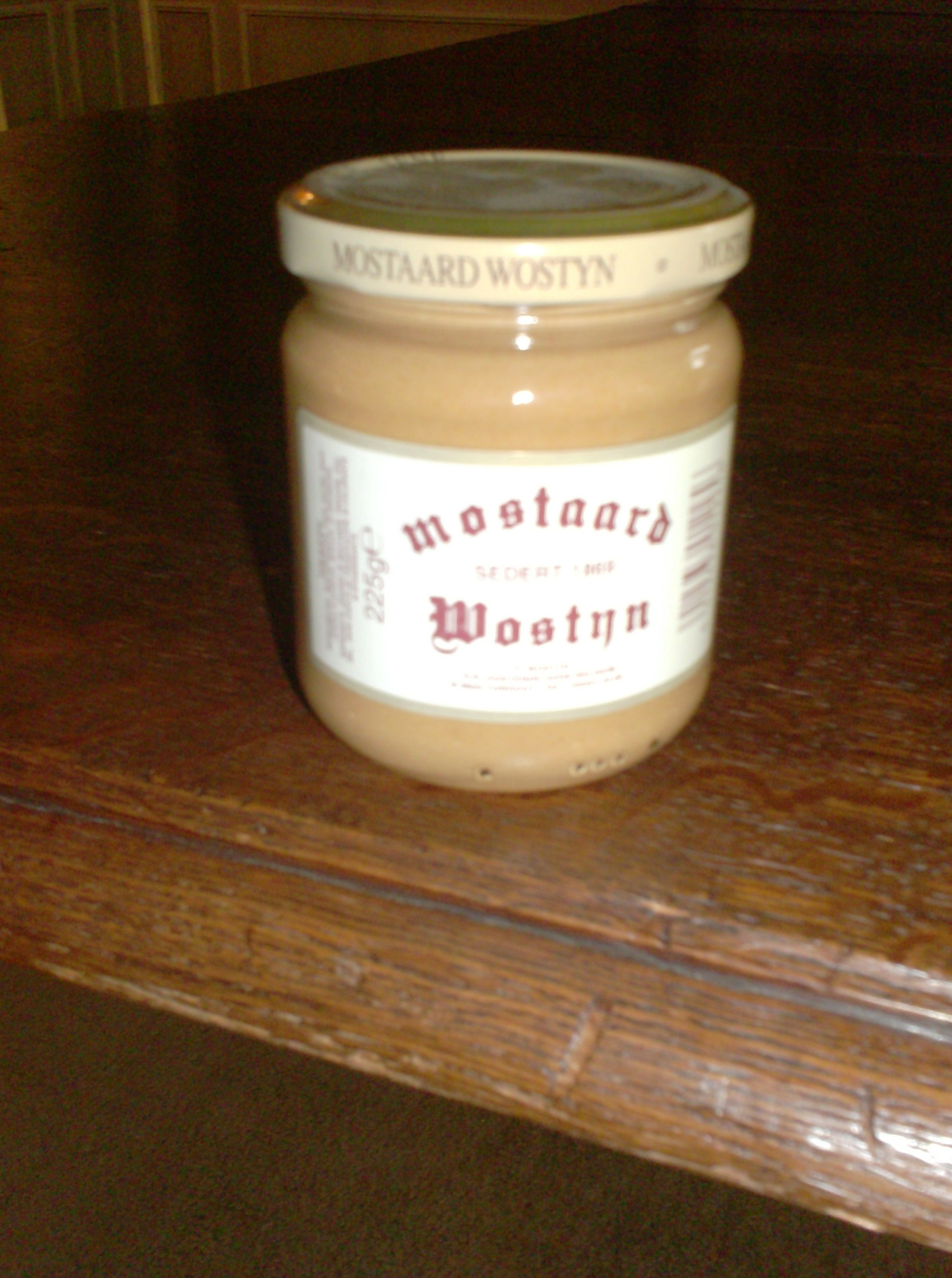 Foto van een potje Mostaard Wostyn, particulier gebruik.